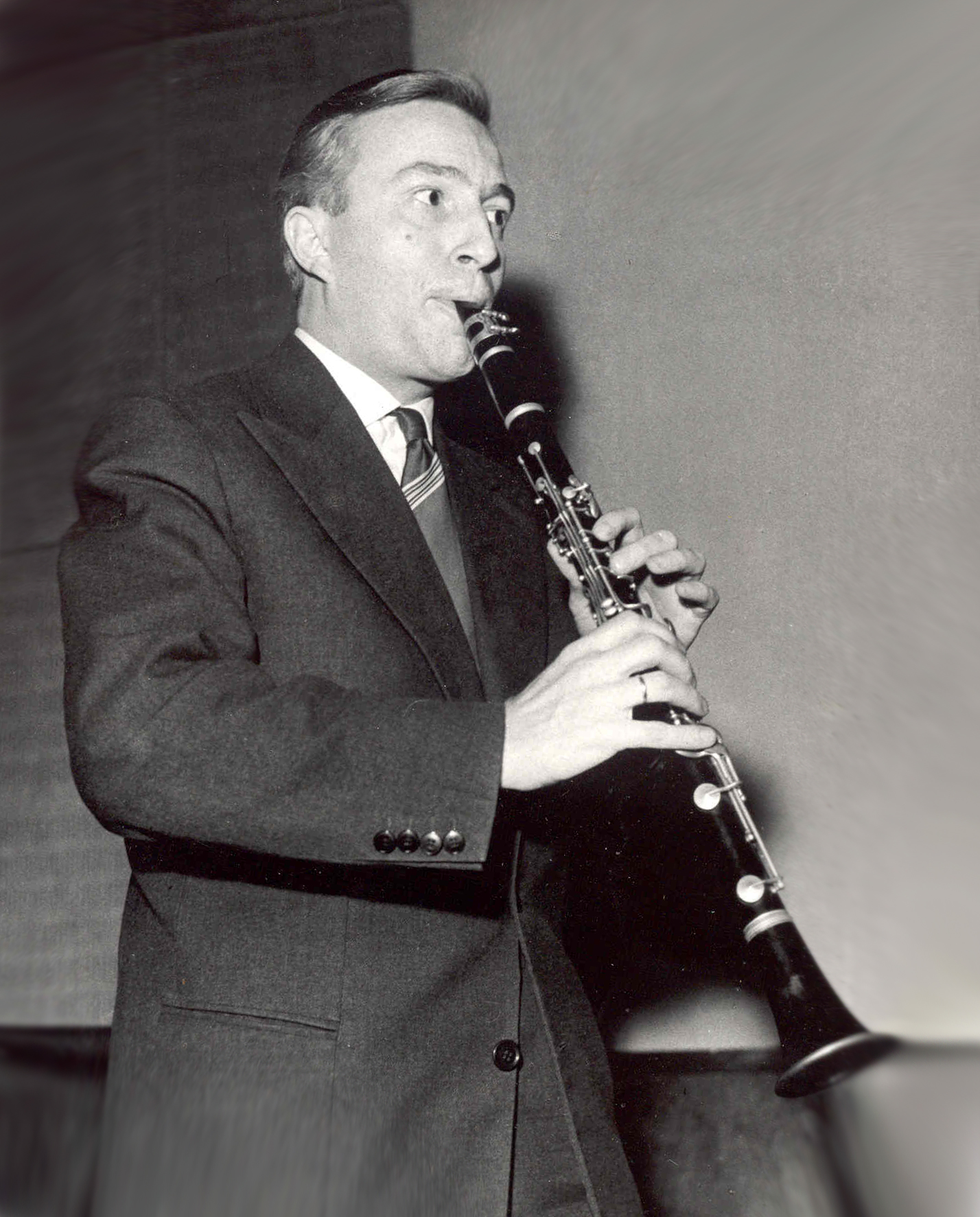 Mihailo Živanović